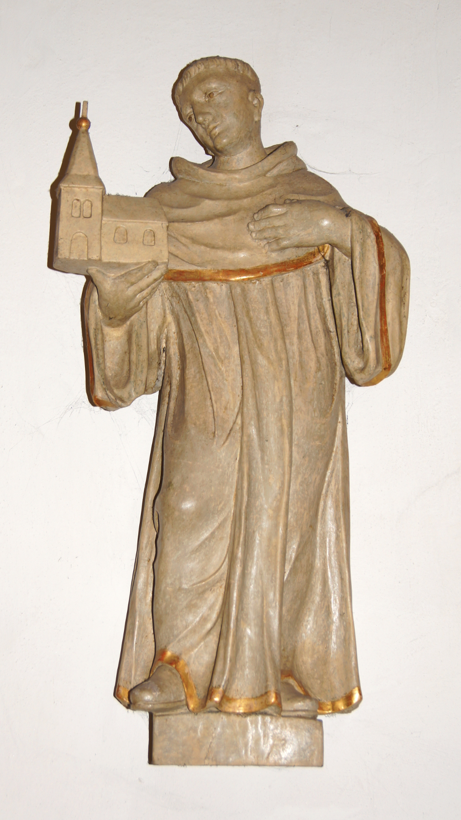 Hölzerne Statue des Hl. Robert von Molesme (1027 - 1111) in der Klosterkirche St. Marien Burlo, Stadt Borken (NRW). Die Entstehung der Figur wird auf das Ende des 17. / Anfang des 18. Jahrhunderts datiert. This is a photograph of an architectural monument. A1 - A 26